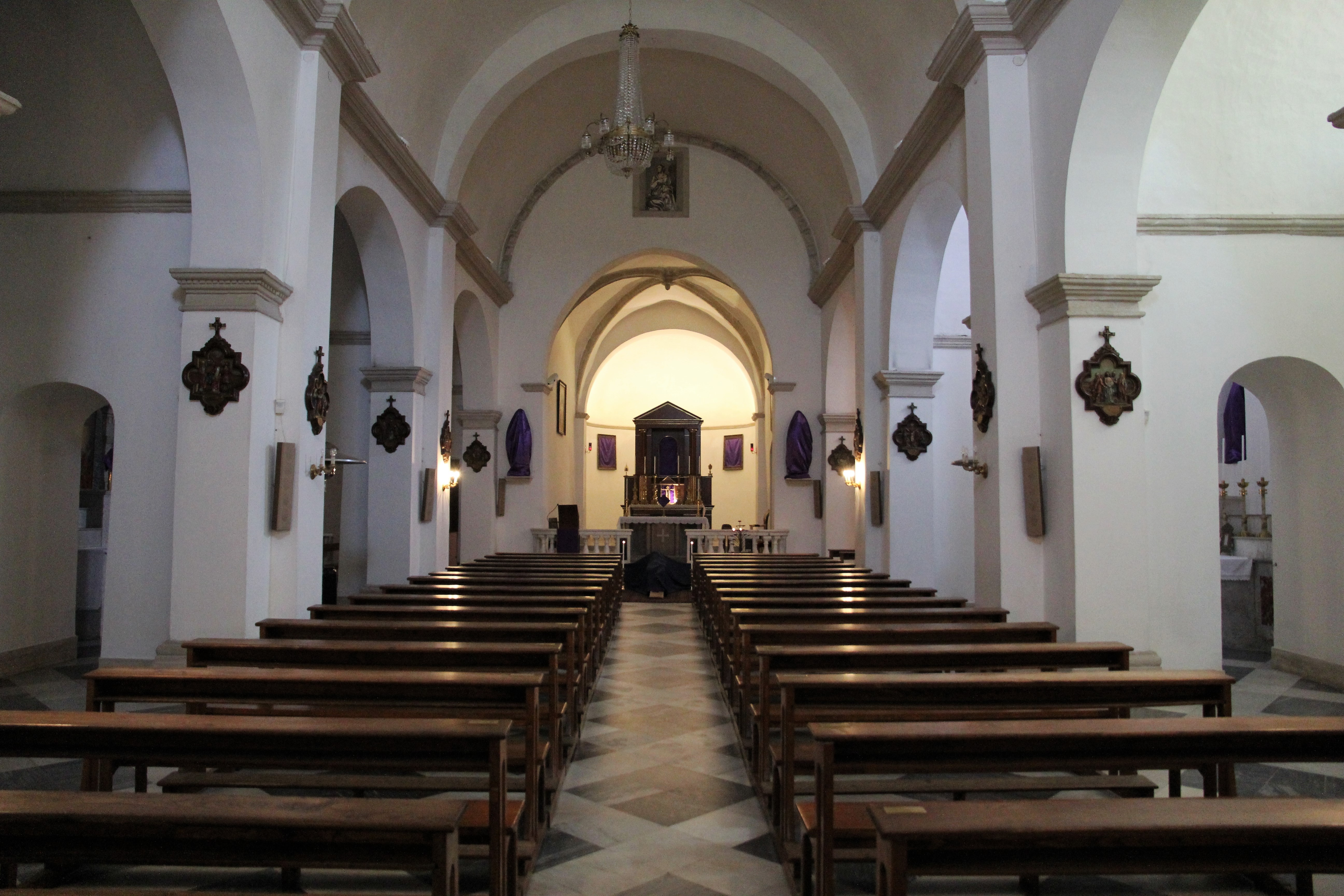 Siligo, chiesa di Santa Vittoria